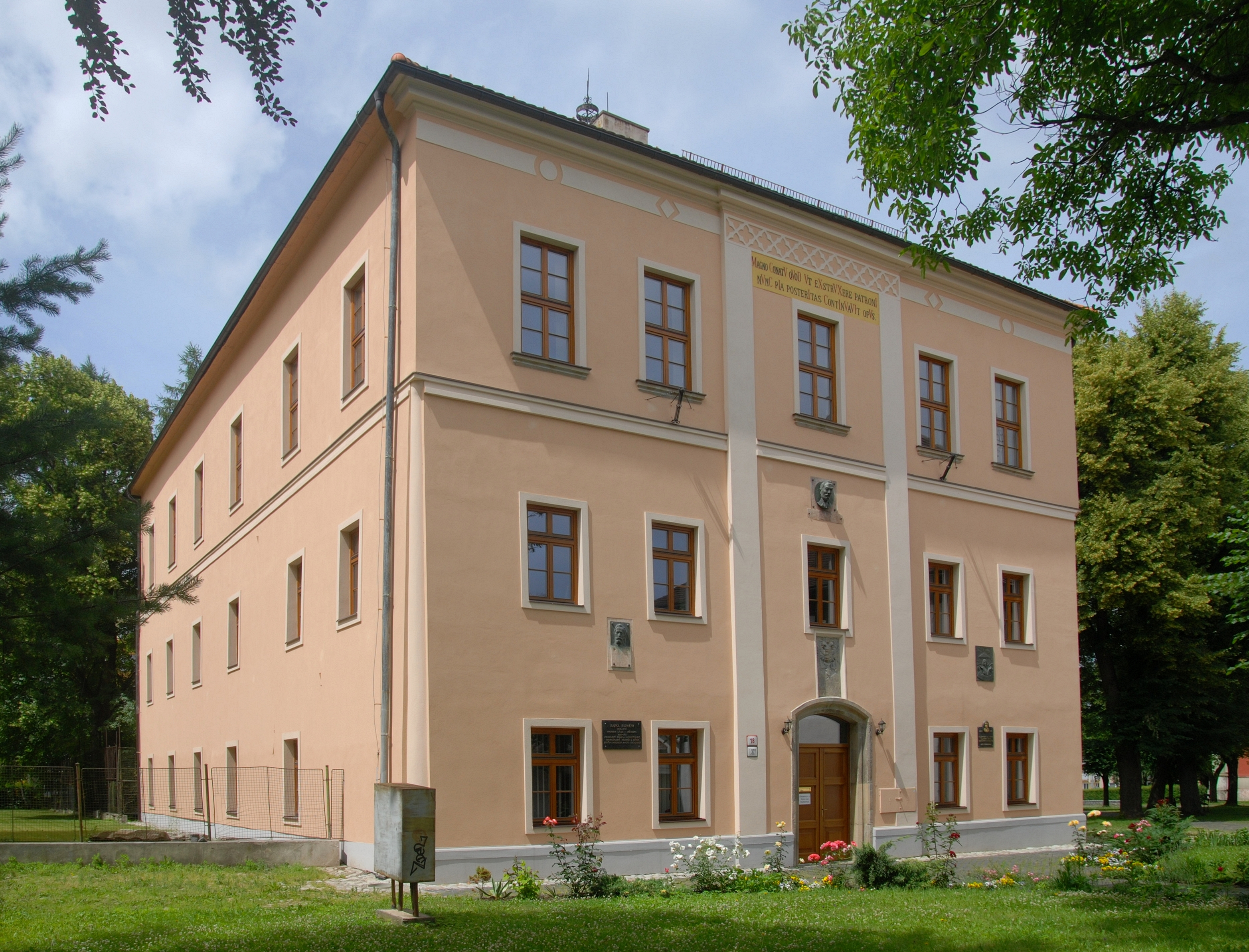 miasto Kežmarok